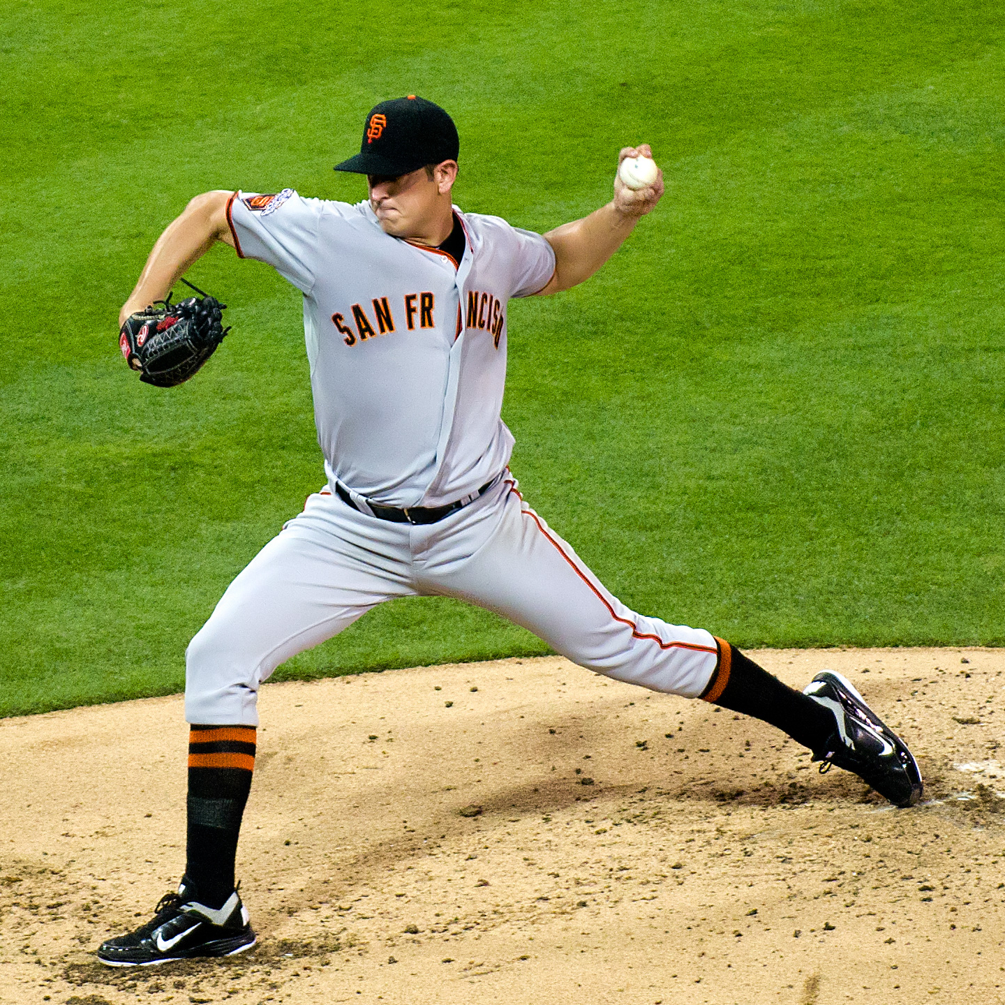 Eric Surkamp